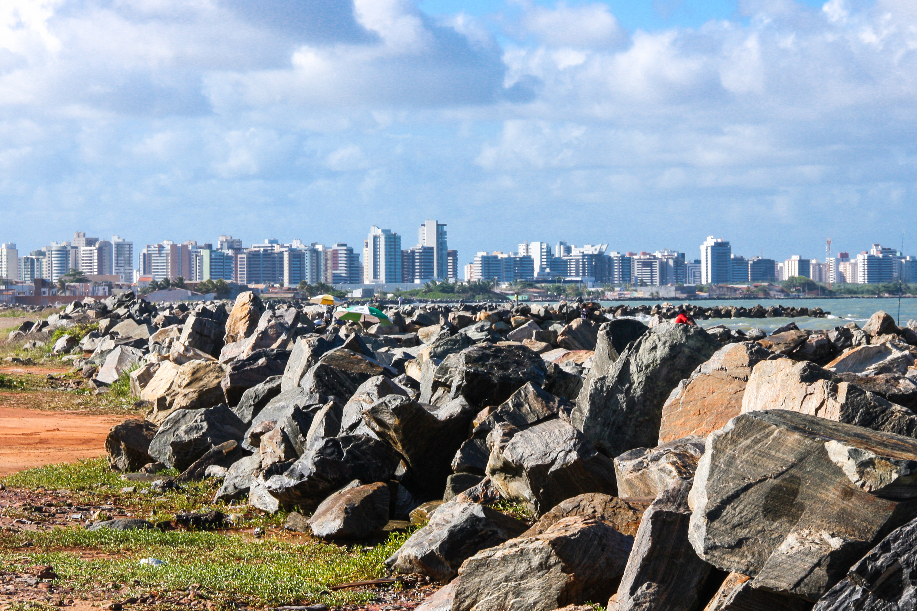 Mole da coroa do meio